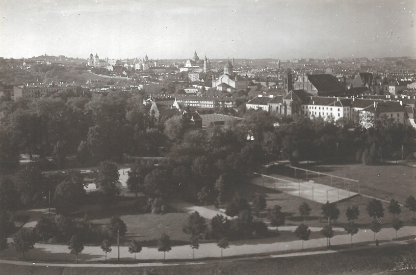 Беларуская (тарашкевіца): Вільня (Vilnia), Бэрнардынскі Сад (Bernardynski Sad)